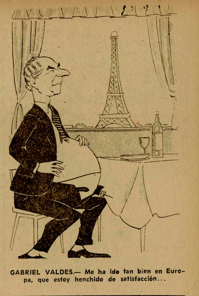 Gabriel Valdés fue ministro de Relaciones Exteriores, presidente del Senado y reconocido líder dentro de la DC